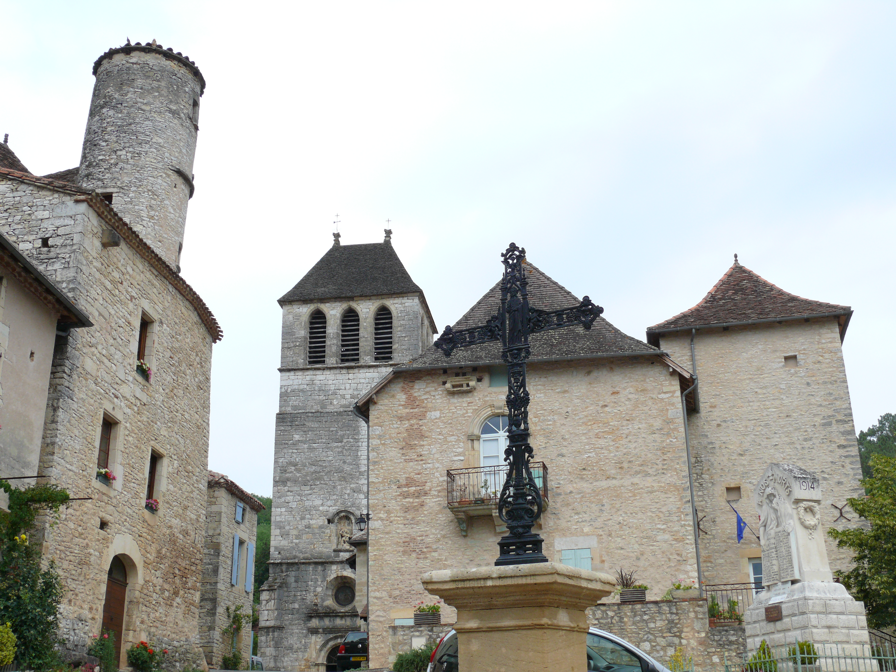 Lherm - Place du village